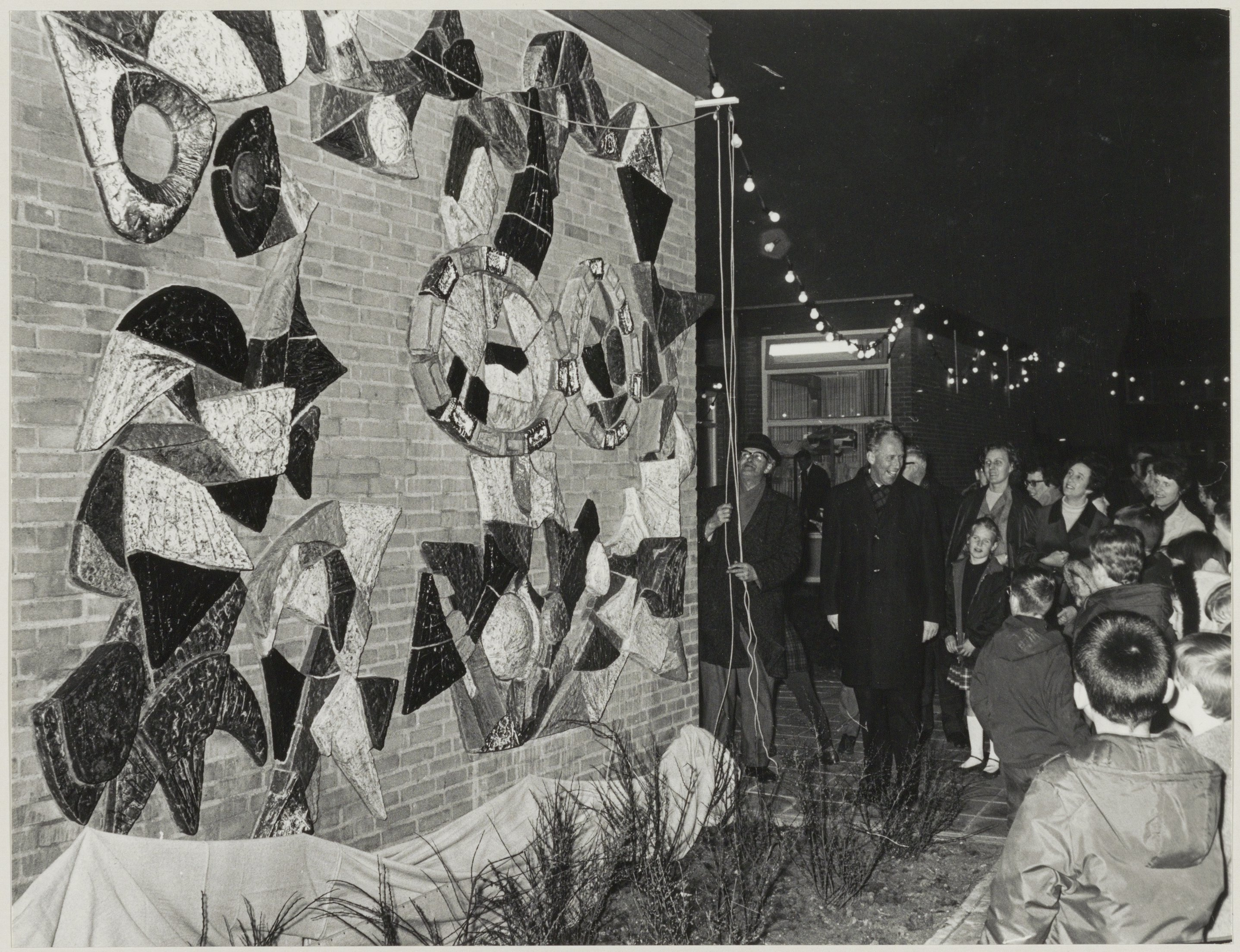 CollectieCollectie Fotoburo de BoerInventarisnummerNL-HlmNHA_54011827BeschrijvingOnthulling van een keramische wand van Kees Okx aan de John F. Kennedyschool, door wethouder D.J.A. Geluk (2e van links).FotonummerNL-HlmNHA_1478_4590DocumenttypeHistorieprenten, tekeningen en foto'sVervaardigerBoer, Cees de (1918-1985) Soort vervaardigerFotograaf LandNederland ProvincieNoord-Holland GemeenteHaarlem PlaatsHaarlem StraatSemmelweisstraat GeografischSchalkwijk Begindatum1967Einddatum1967TechniekFoto Trefwoordenonderwijs, beeldende kunsten